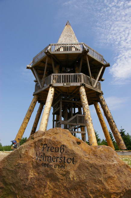 Das Forstamt Paderborn errichtete 2003 den Eggeturm. Die Holz-Konstruktion des Aussichtsturms ist 17 m hoch, die Aussichtsplattform befindet sich auf 9,15 m Höhe.